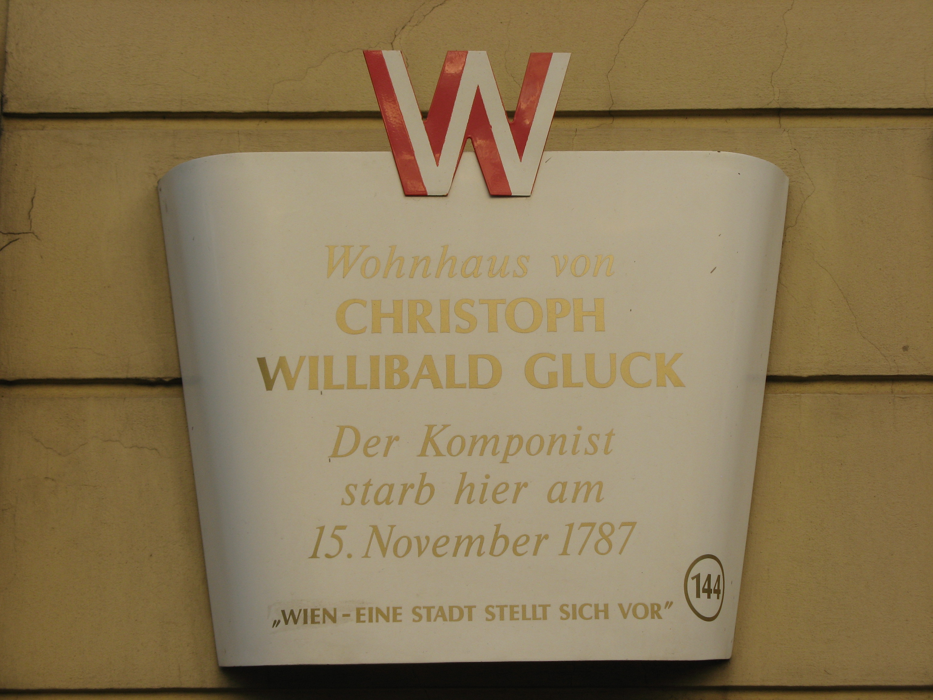 Gedenktafel am Wohn- und Sterbehaus von Christoph Willibald Gluck, Wiedner Hauptstraße 32, Wien-Wieden